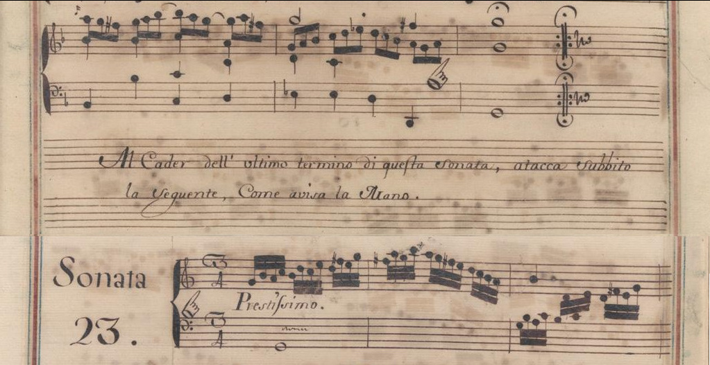 Fin de la sonate K. 347 et début de la sonate K. 348 du volume VII du manuscrit de Venise, montrant la main et le texte qui demande impérativement d'enchaîner les deux sonates.